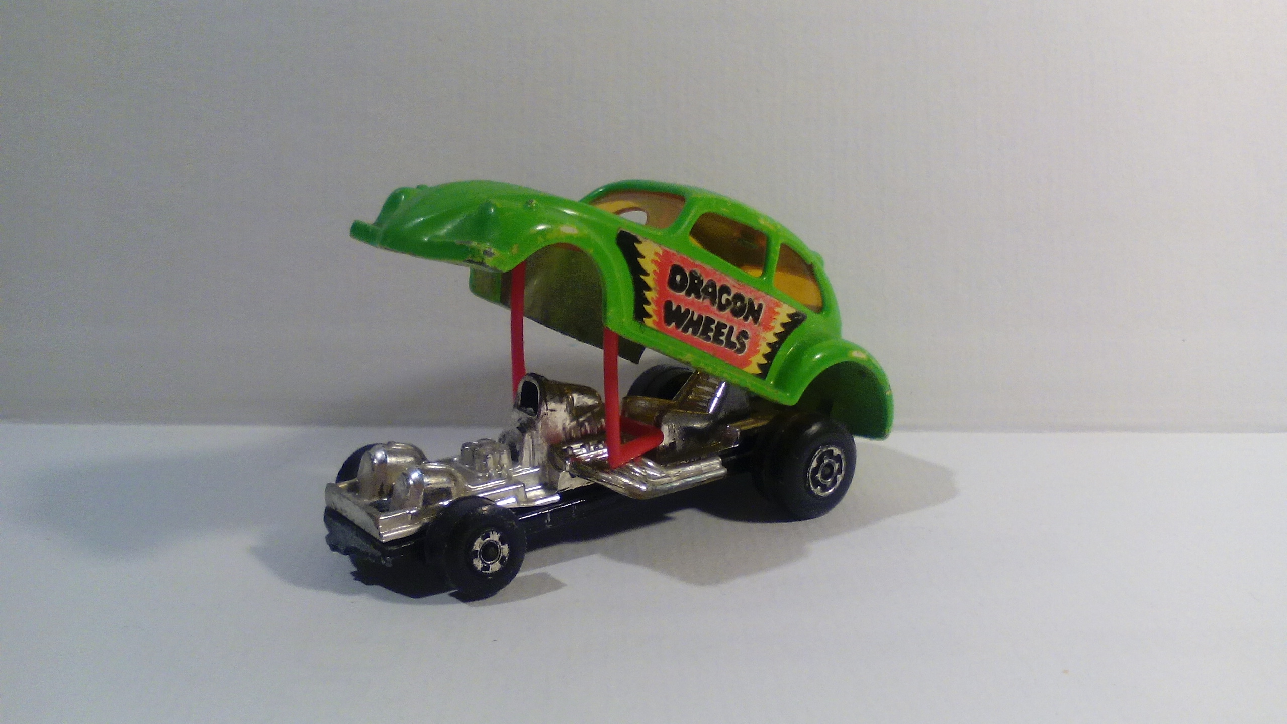 A Matchbox Dragon Wheels VW from the 70's